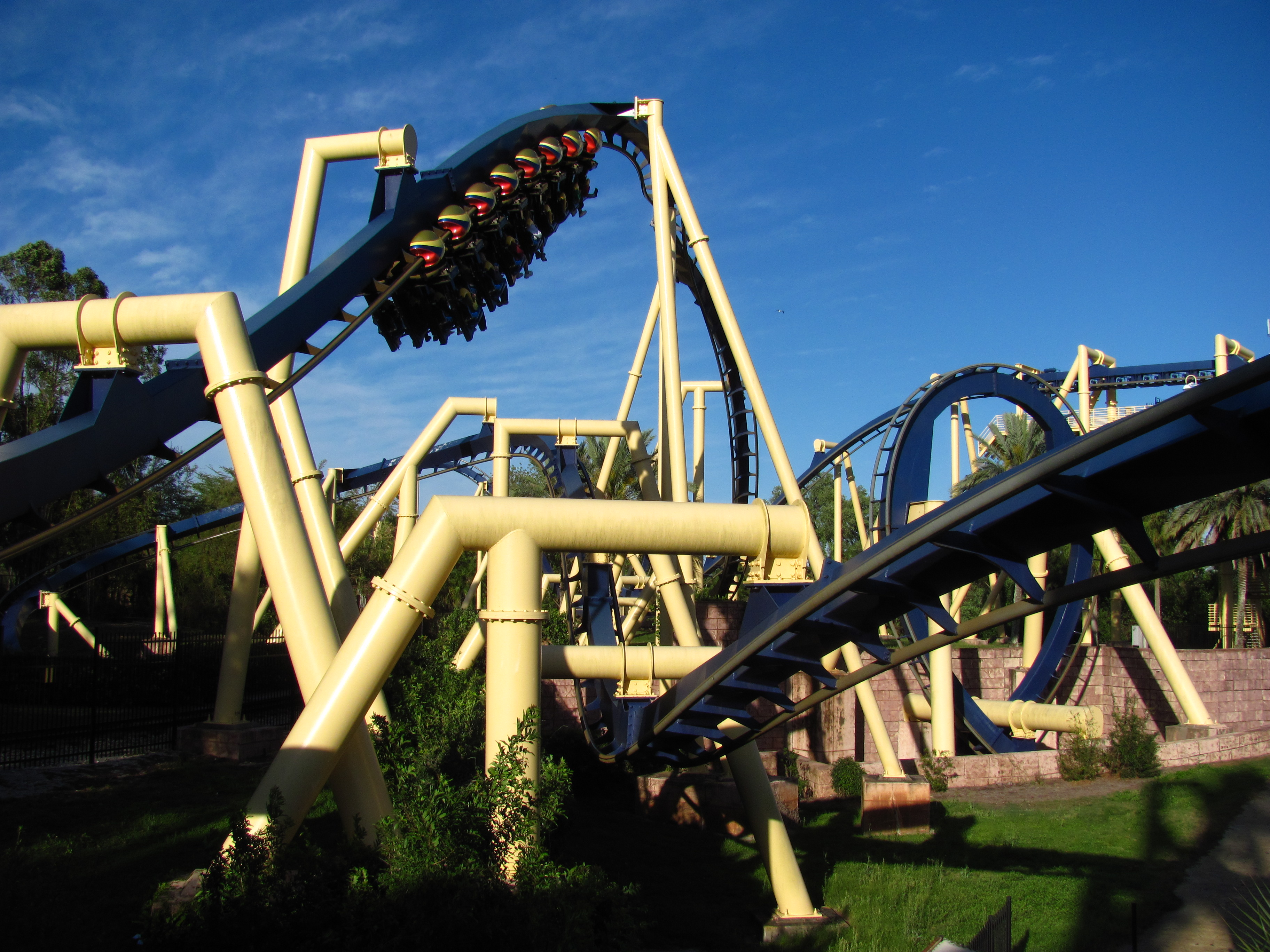 Montu Montu at Busch Gardens Tampa Bay